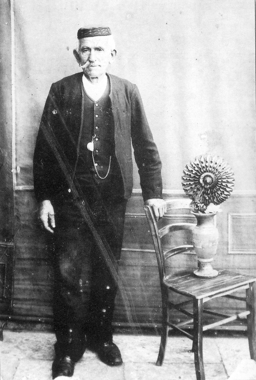 Andrija Skračić iz Murtera (r. 15. 11. 1841., u. 13. 11. 1918.), snimljen 1913. godine. Obiteljsku fotografiju je prof. Tanja Skračić dozvolila objaviti u knjizi Marka Mudronje "Tragom baštine", Murter 2007. (str. 94) i na hrvatskoj vikipediji.